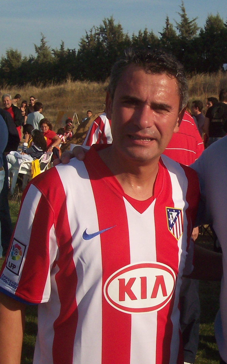 Manuel Sánchez Delgado, "Manolo". Exjugador del Atlético de Madrid y "Pichichi".